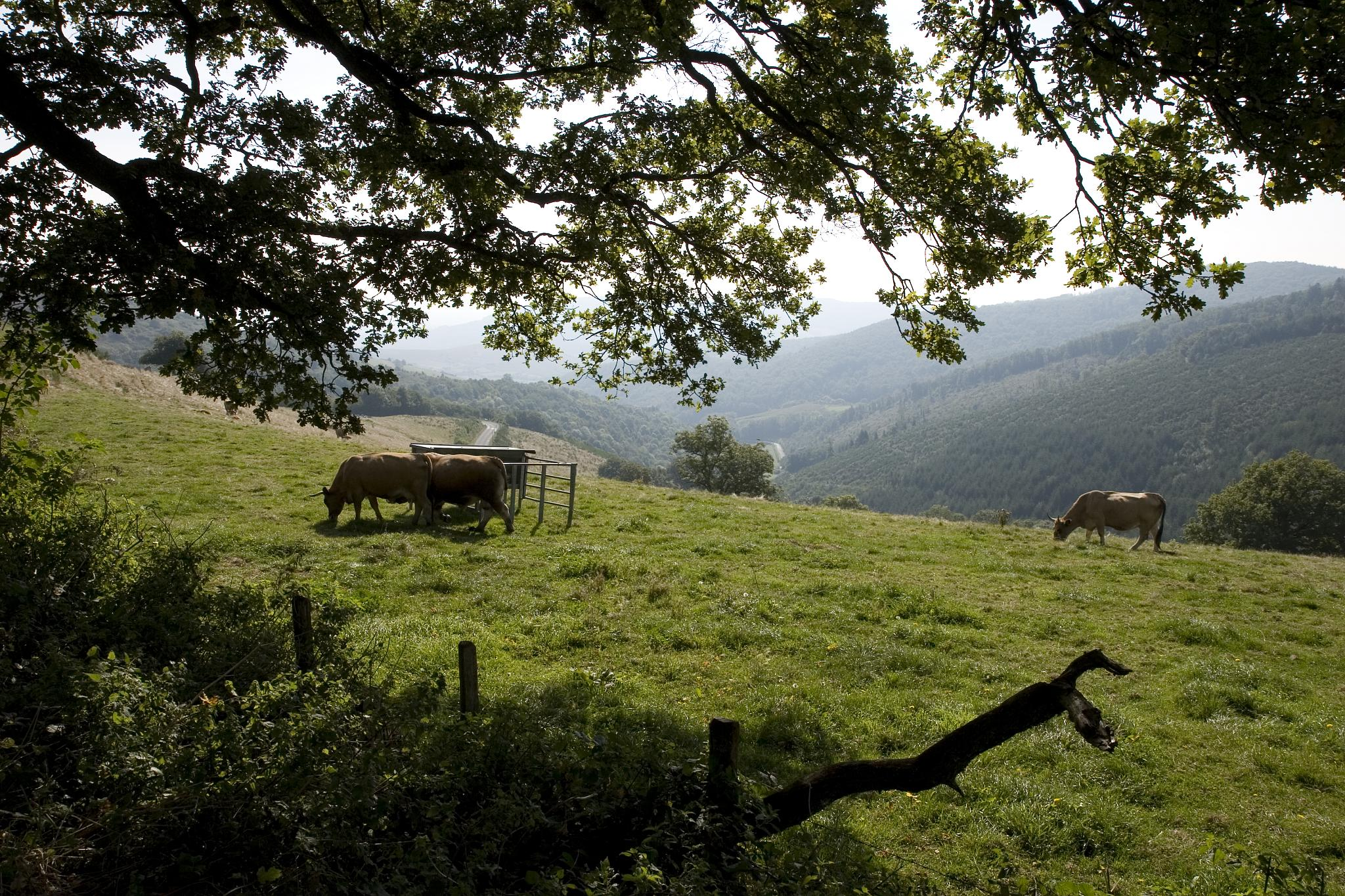 Commune de Jullié - Altitude 638m